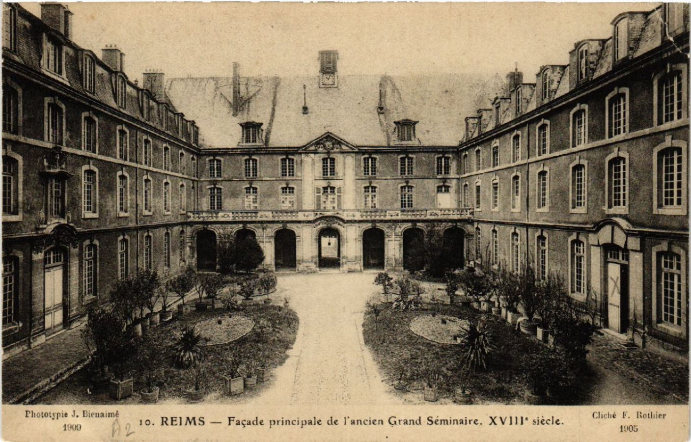 Ancien grand séminaire de Reims confisqué en 1905 pour devenir le musée des beaux-arts.